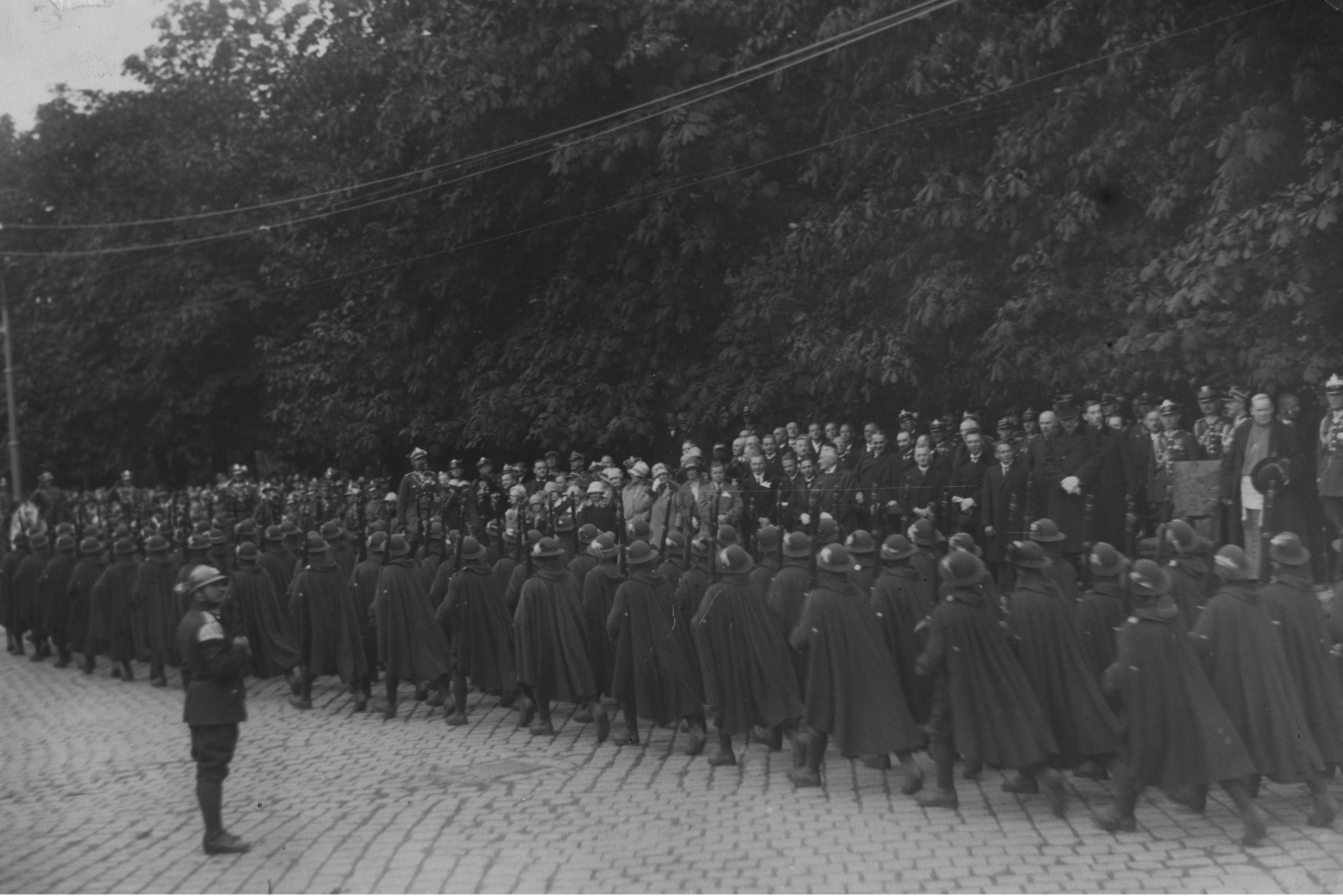 Wręczenie sztandaru 3 Pułkowi Strzelców Podhalańskich w Bielsku - pułk defiluje przed prezydentem Ignacym Mościckim. Koncern Ilustrowany Kurier Codzienny - Archiwum Ilustracji. Sygnatura: 1-W-1319-2